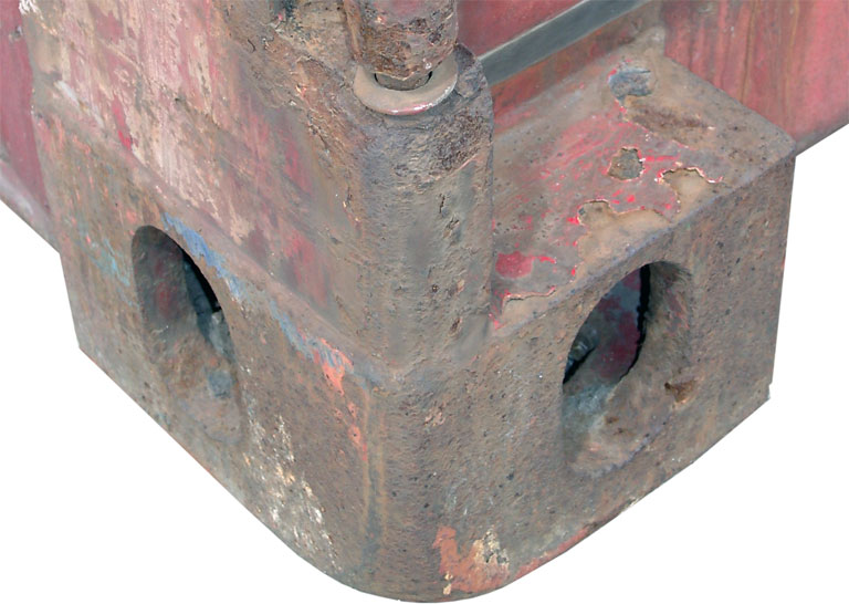 GNU-FDL, selbst fotografiert